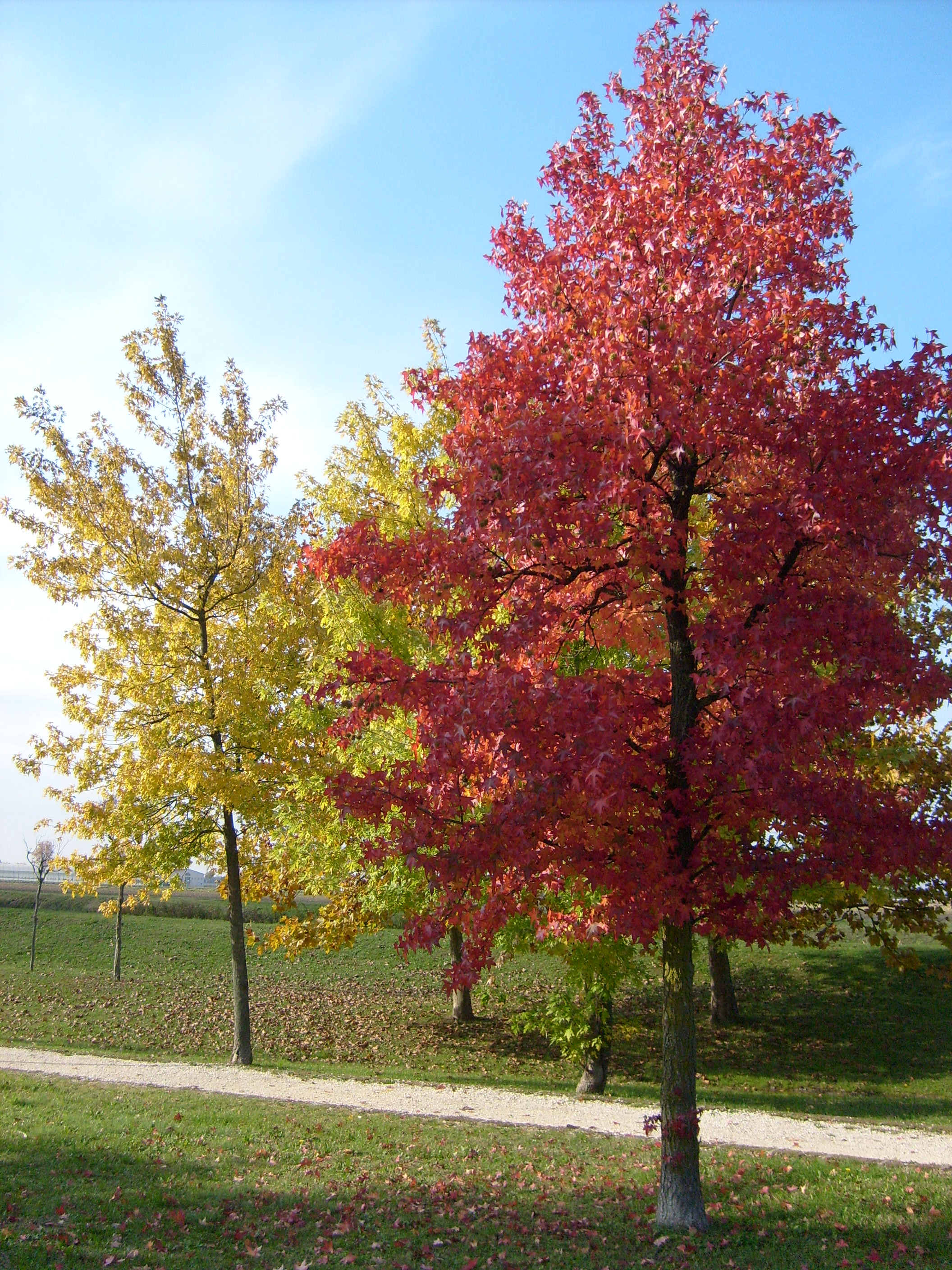 L'autunno e gli alberi ripresi nel parco di Marcon, provincia di Venezia.